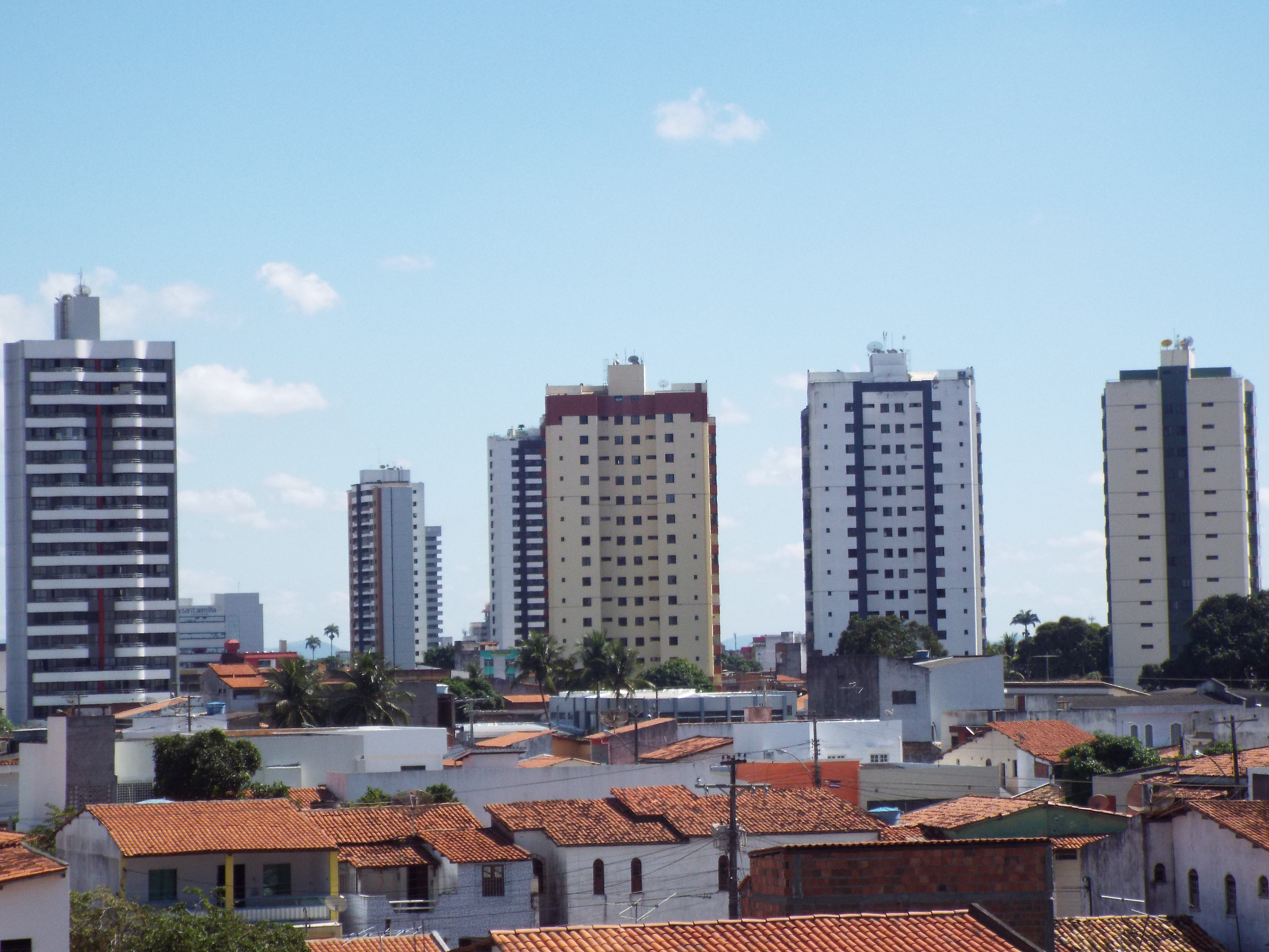 bairro ponto central